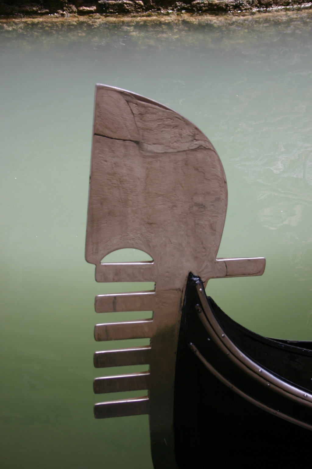 Venezia - Gondola: ferro di prua (fero da prova o dolfin)